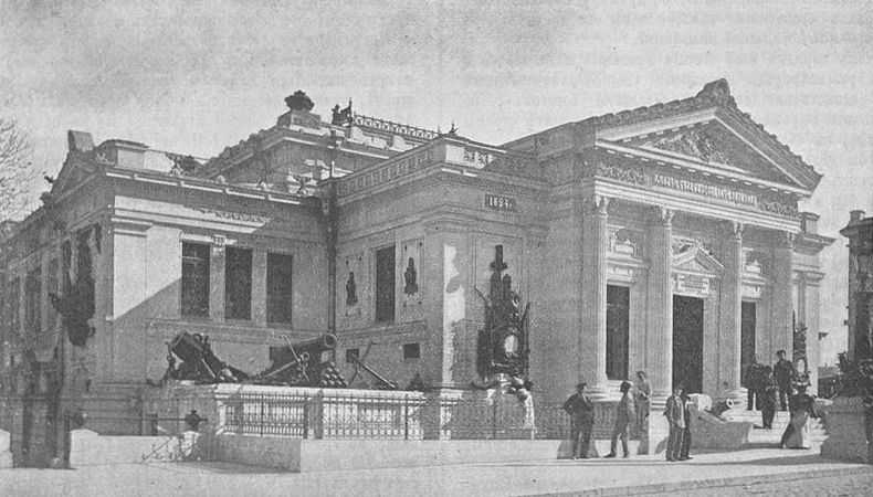 1897 год. Музей Севастопольской обороны.